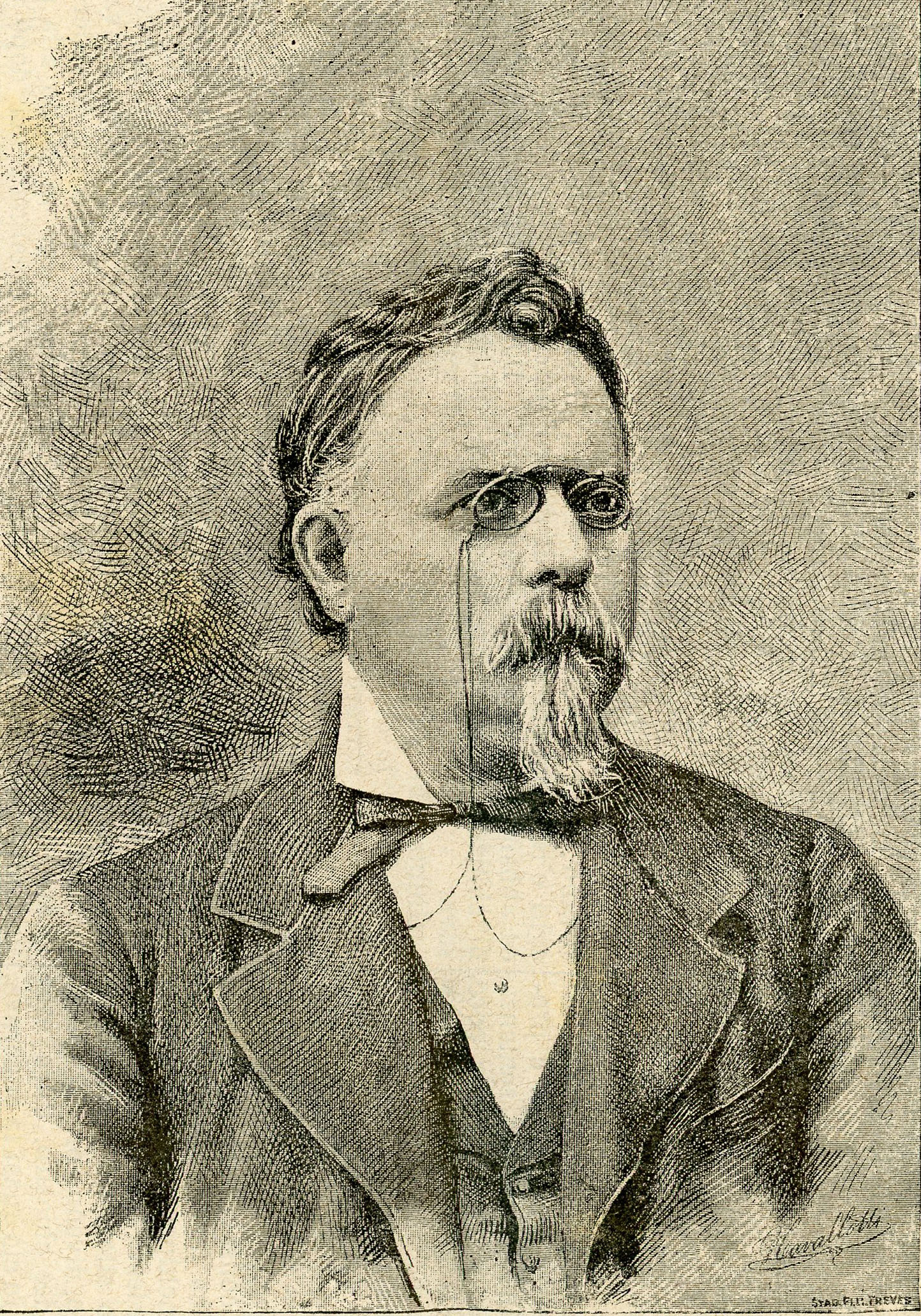 Il filosofo e pedagogista Pietro Siciliani, morto a Firenze il 28 dicembre 1885 (incisione).